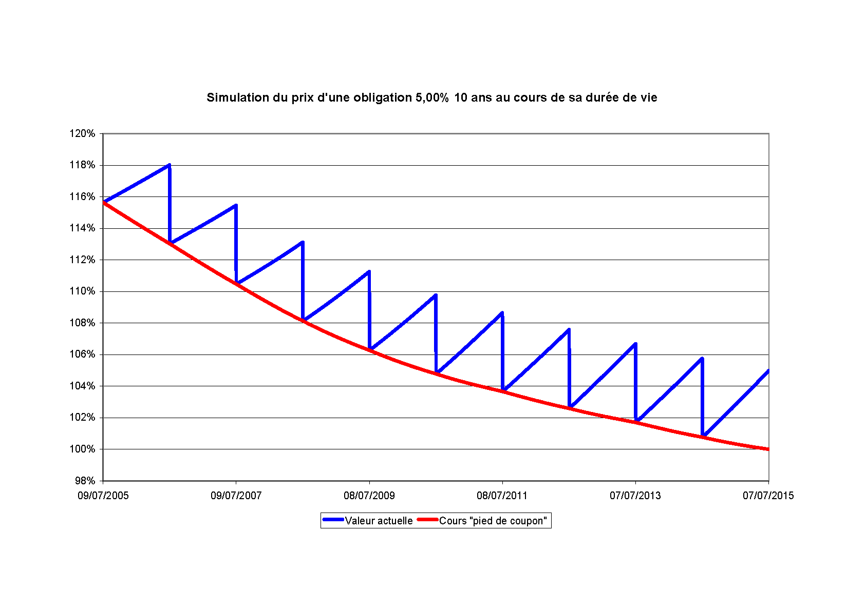 Bond price simulation